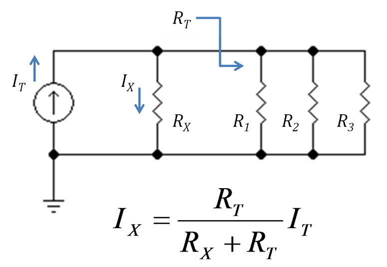 Simple current divider